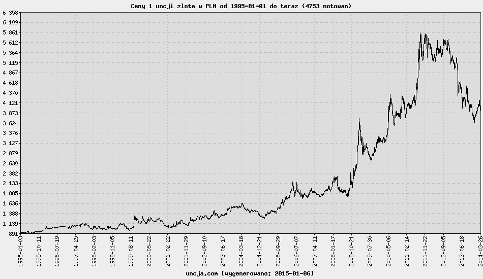 Ceny 1 uncji złota w PLN od 1 stycznia 1995 do teraz